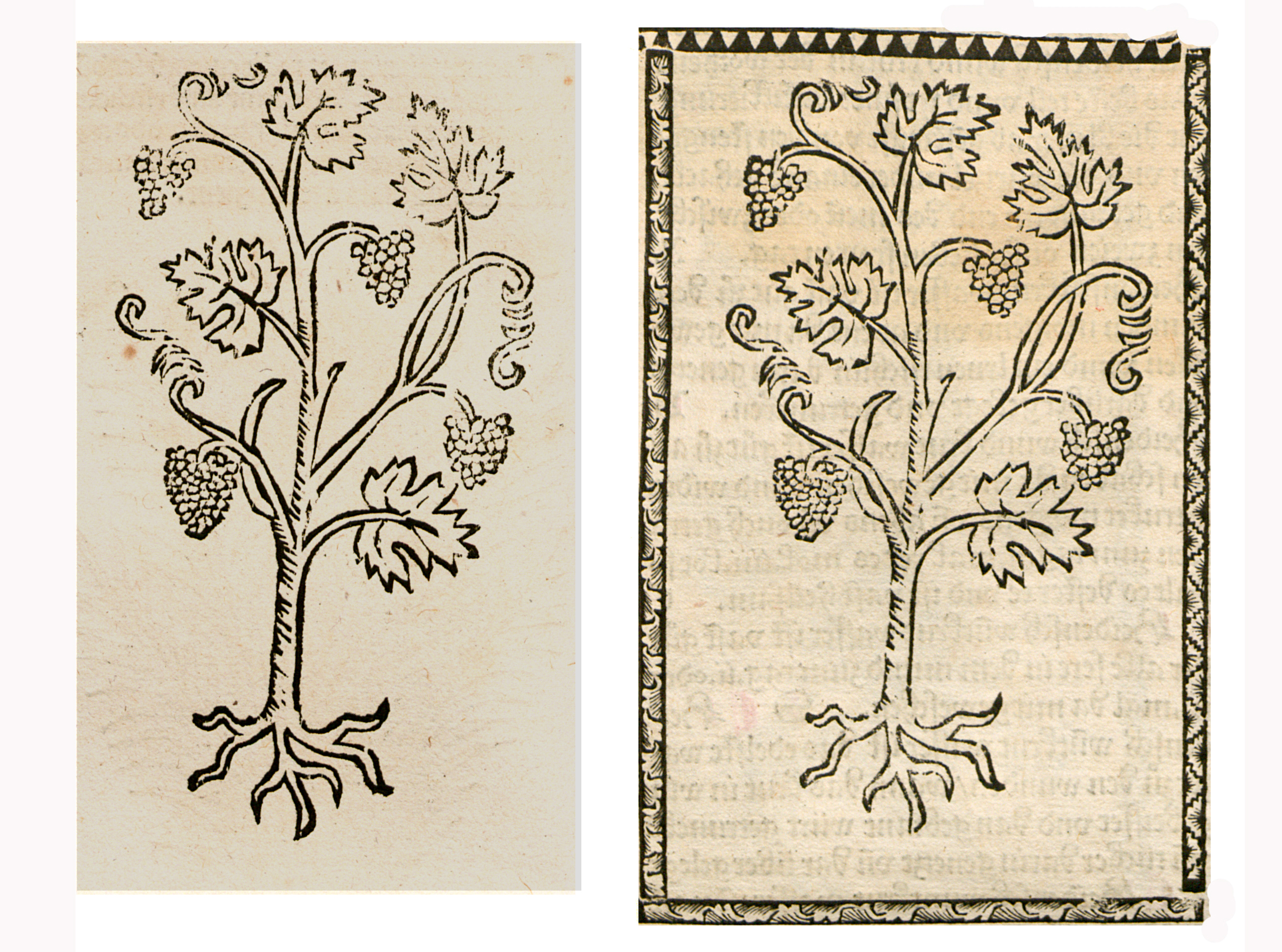 Abbildung von: Hymp ber (Rubus idaeus)